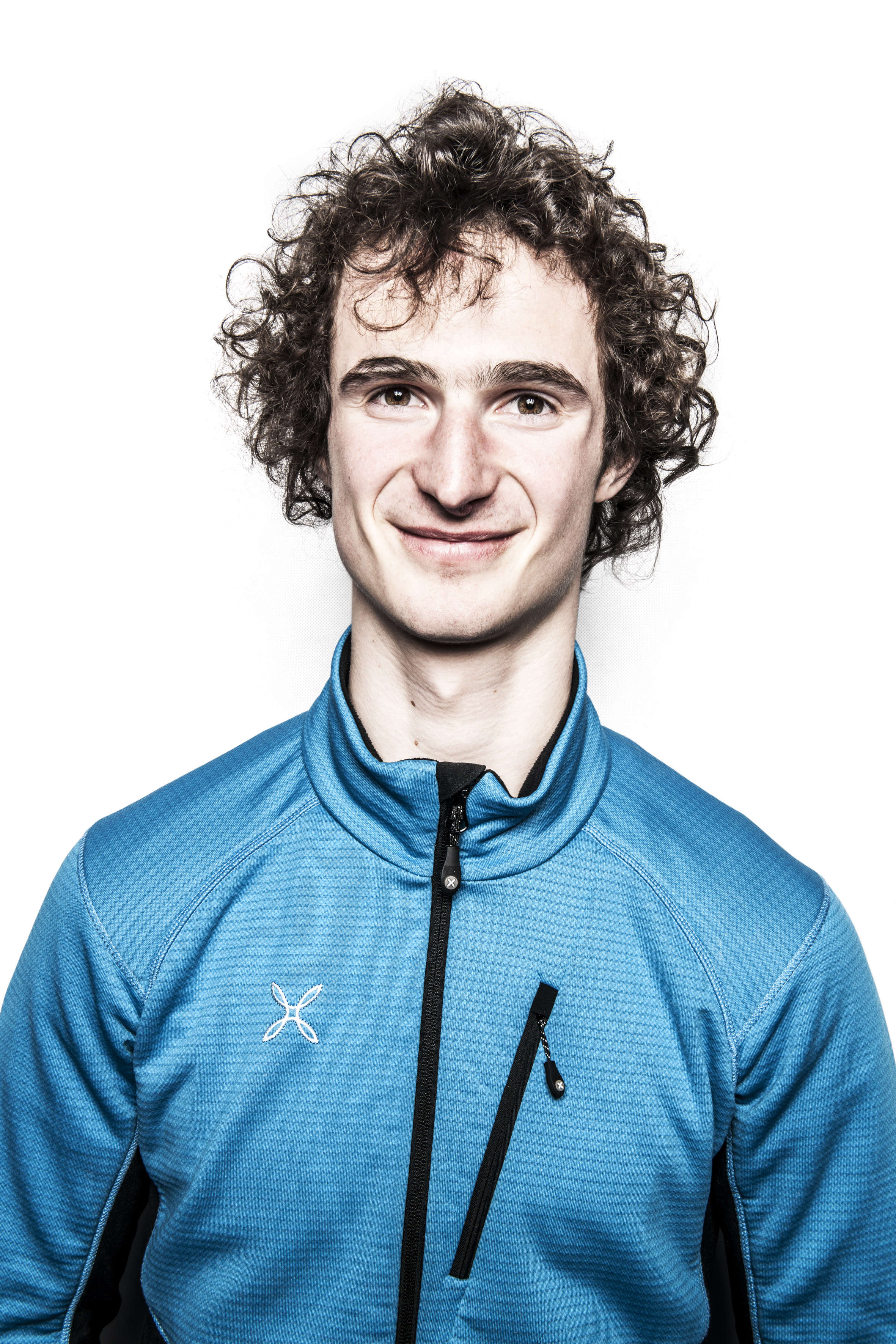 Adam Ondra, 2018